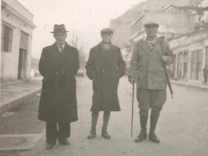 Balli Kombëtar leaders Ali Këlçyra, Mit'hat Frashëri, Thoma Orollogaj (from left to right) in Berat